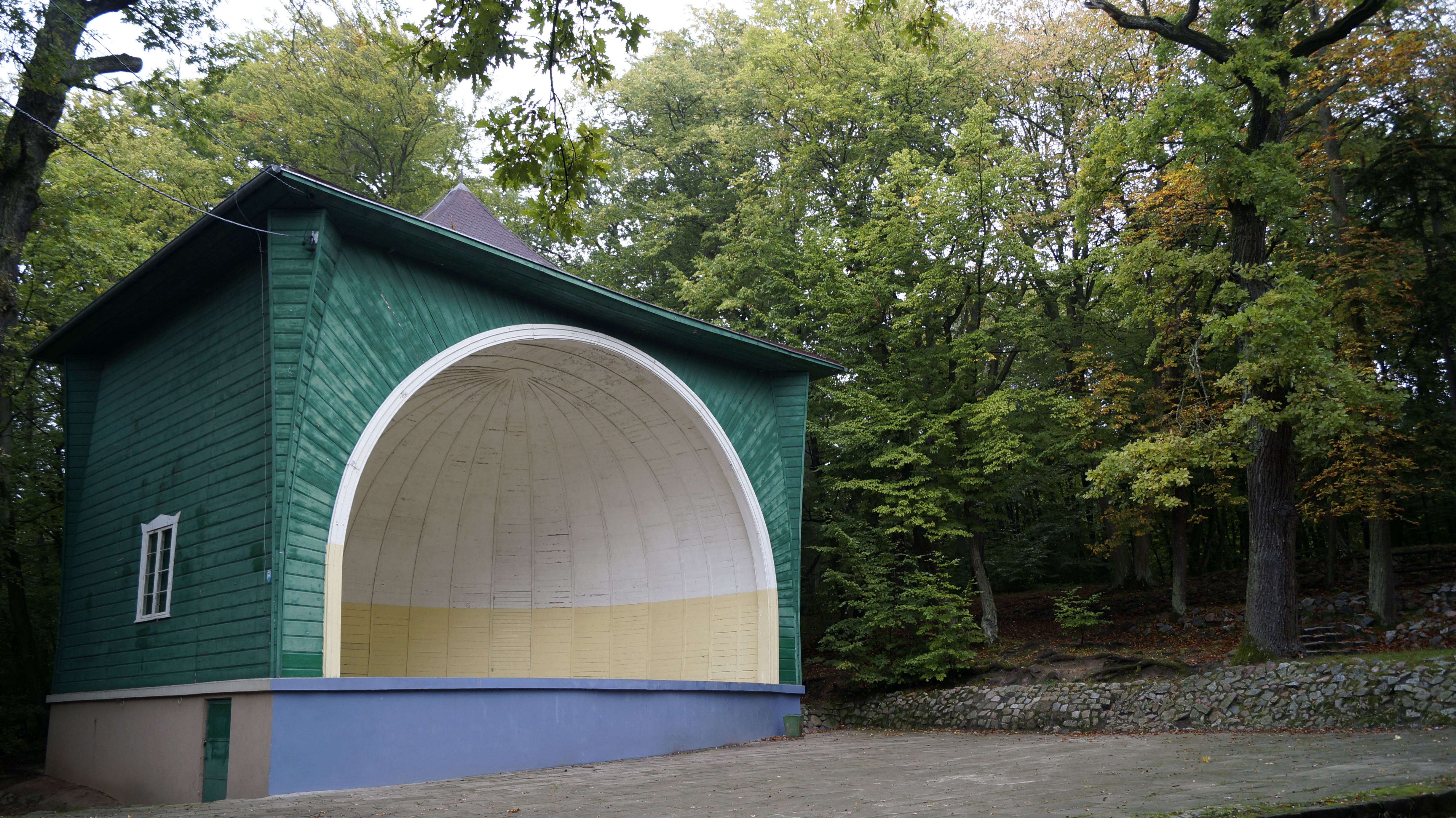 Elbląg, muszla koncertowa, 1820